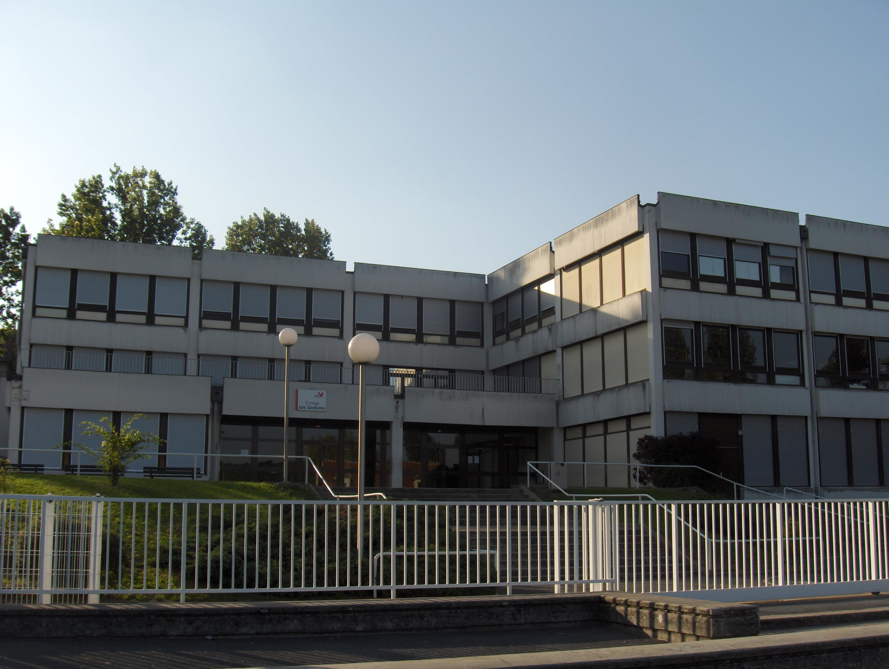 Collège Les Coutures à Parmain (Val-d'Oise)